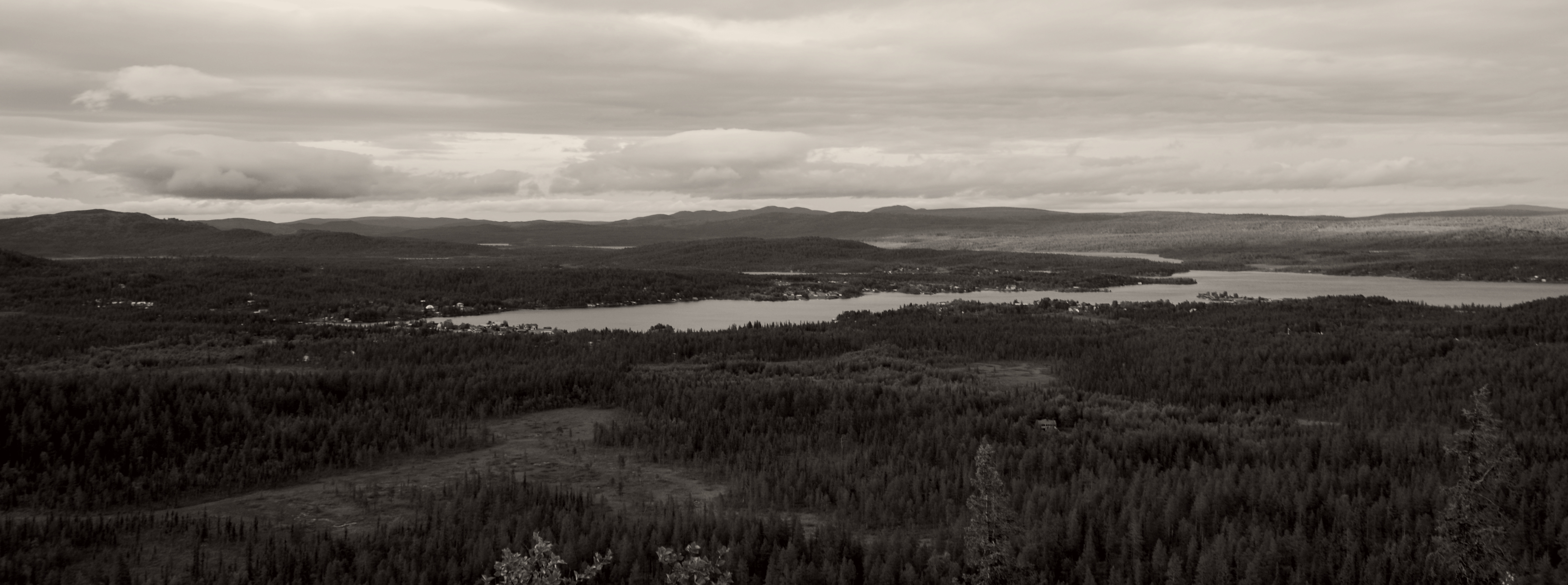 Kurravaara by. Jukkasjärvi församling, Norrbottens län. Viken Lahti, vilken byn omgärdar, en vik av Torneälven